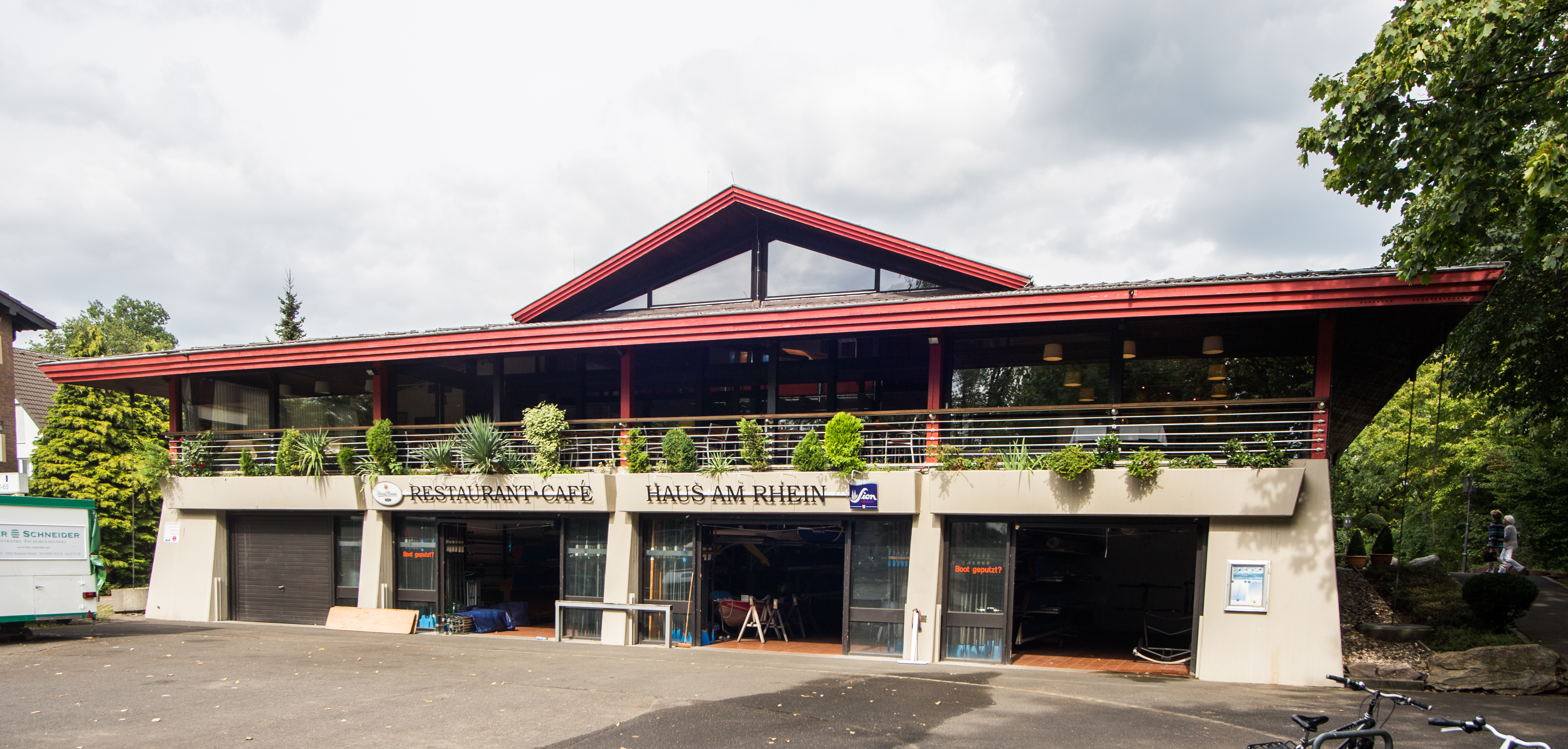 Haus am Rhein (Clubhaus der Bonner Rudergesellschaft), Elsa-Brändström-Straße 74, Bonn-Beuel-Limperich: Ansicht der Rheinseite